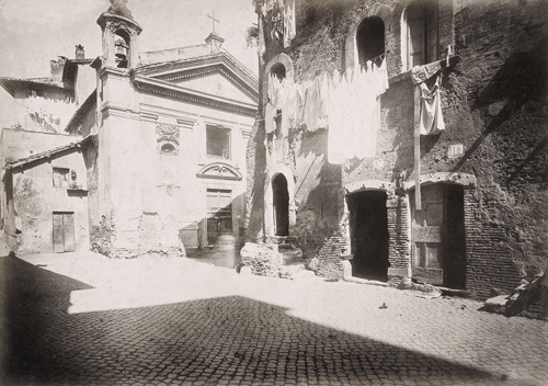 Chiesa distrutta di Santa Bonosa